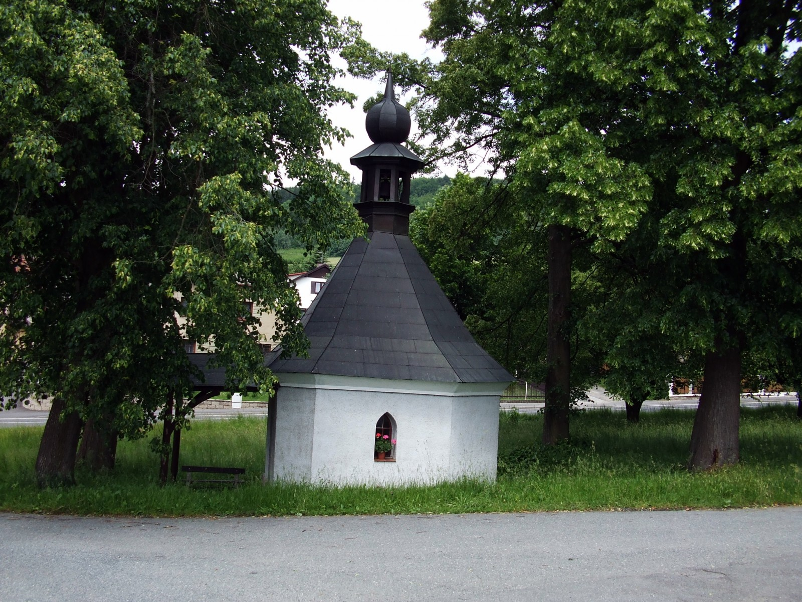 Kaplička v Hluboké u Kdyně